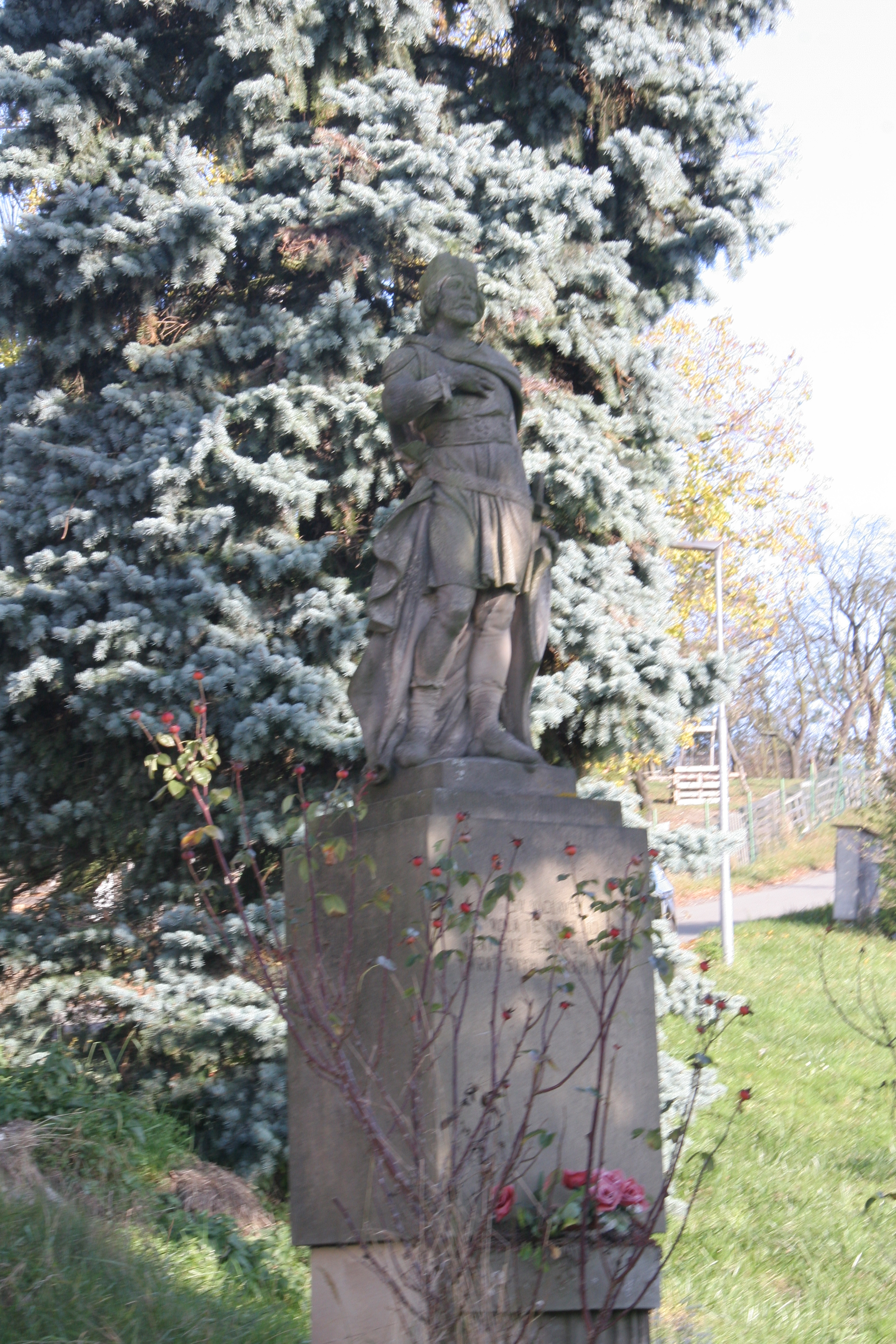 Kamenec svatý Václav